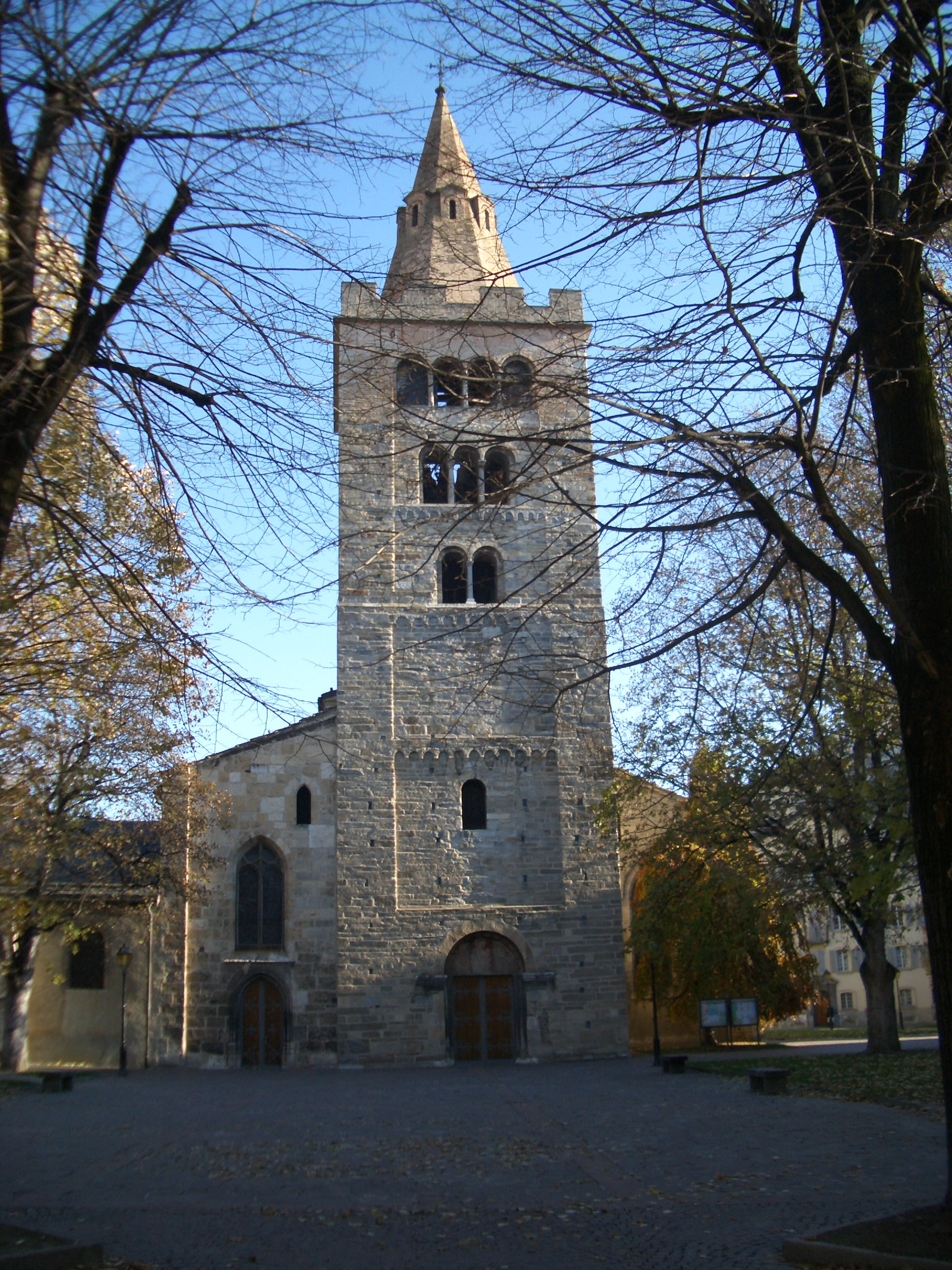 Clocher de la Cathédrale de Sion